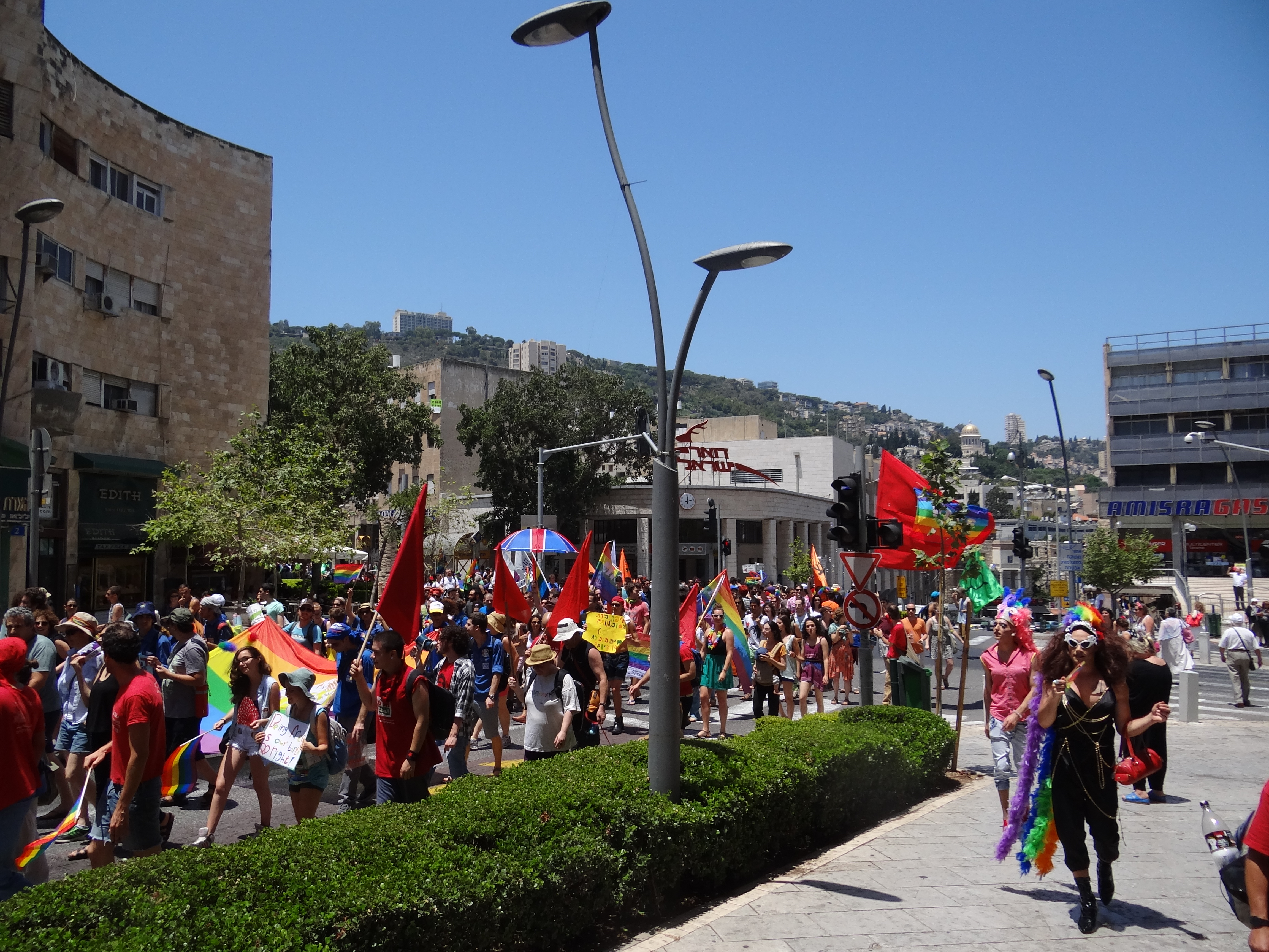 מצעד הגאווה בחיפה שהתקיים ב-27 ביוני 2014. תחילתו הייתה ברחבה ברחוב הנביאים 26 פינת אחד העם. במקום הזה התחילה ההתכנסות. בשעה 12:00 יצא המצעד לדרך בעוברו ברחוב הנביאים לכיוון צפון, פנה ברחוב הרצל עד בית הקרנות שם פנה לרחוב ביאליק, חצה את רחוב החלוץ ועד רחוב חסן שוקרי ורחבת העירייה. שם התקיים מופע ונישאו נאומים. המצעד ברחוב הרצל